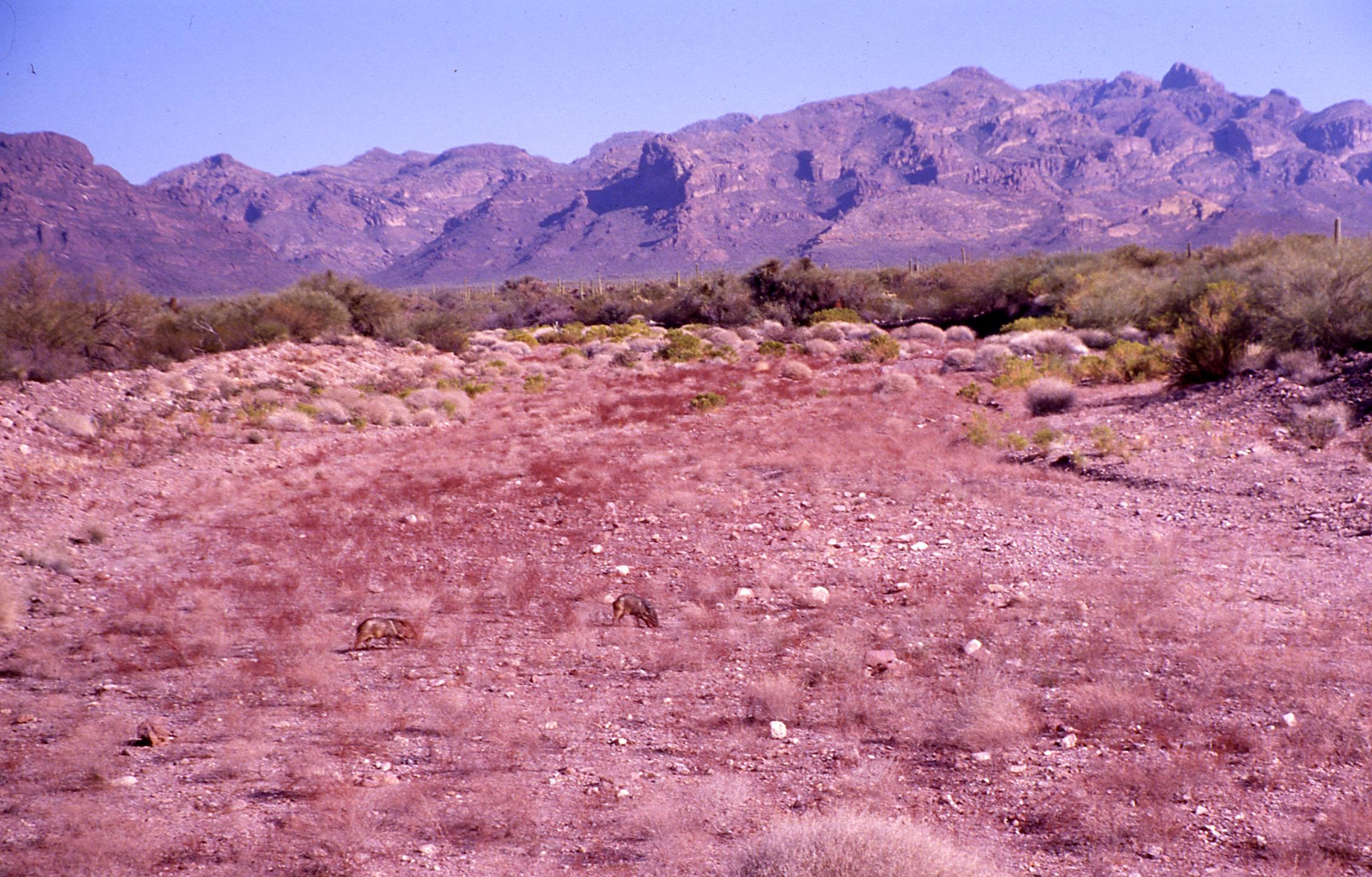 Ein ausgetrocknetes Flussbett im Orgelpfeifenkaktus-National Monument (Arizona). Im Hintergrund die Kette der Ajo Mountains. Pekaris suchen nach Essbarem und Wasser.